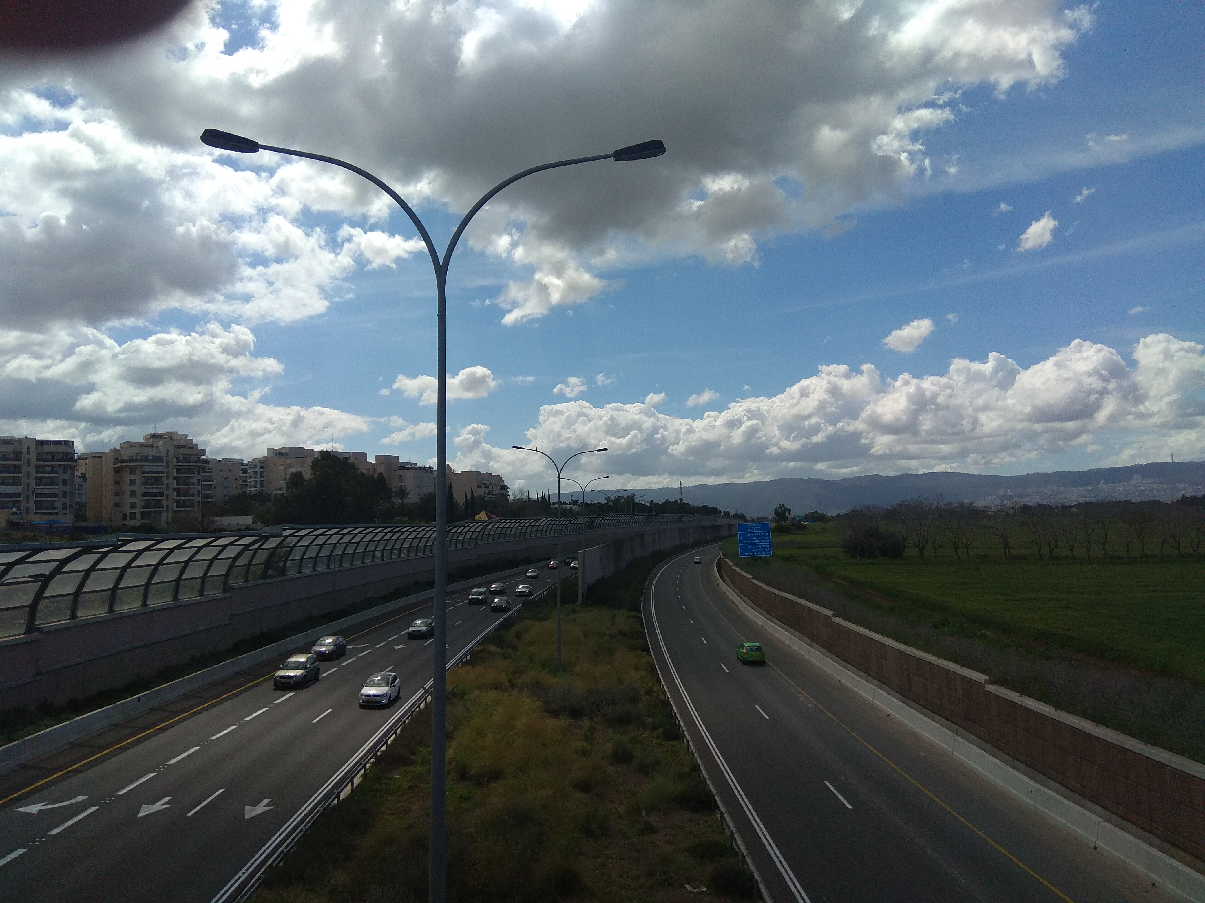 כביש 22 במראה מן הגשר המוביל לשכונת גבעת הרקפות בקריית ביאליק